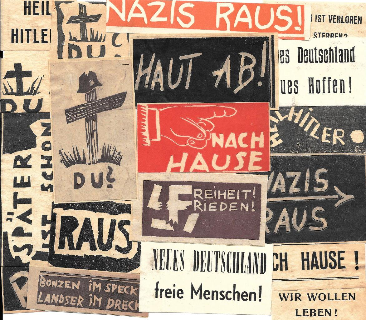 Von der OSS hergestellte "Gummierte Aufkleber" (Gummed Labels)